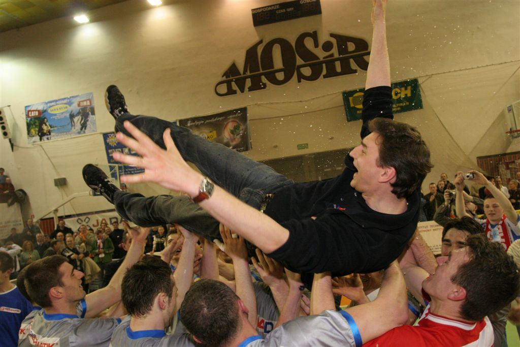 Jadar Radom - 2006